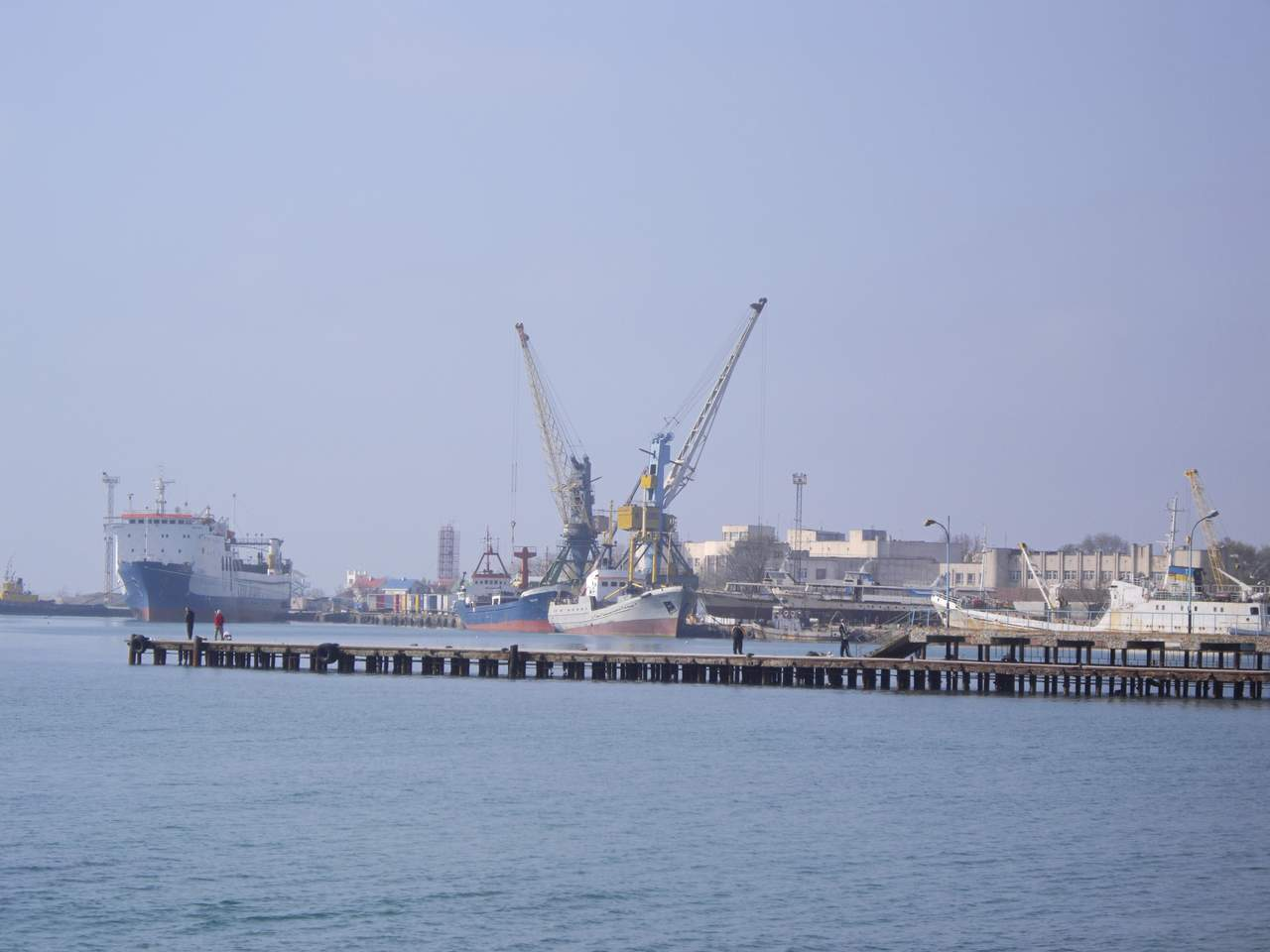 Евпаторийский морской порт